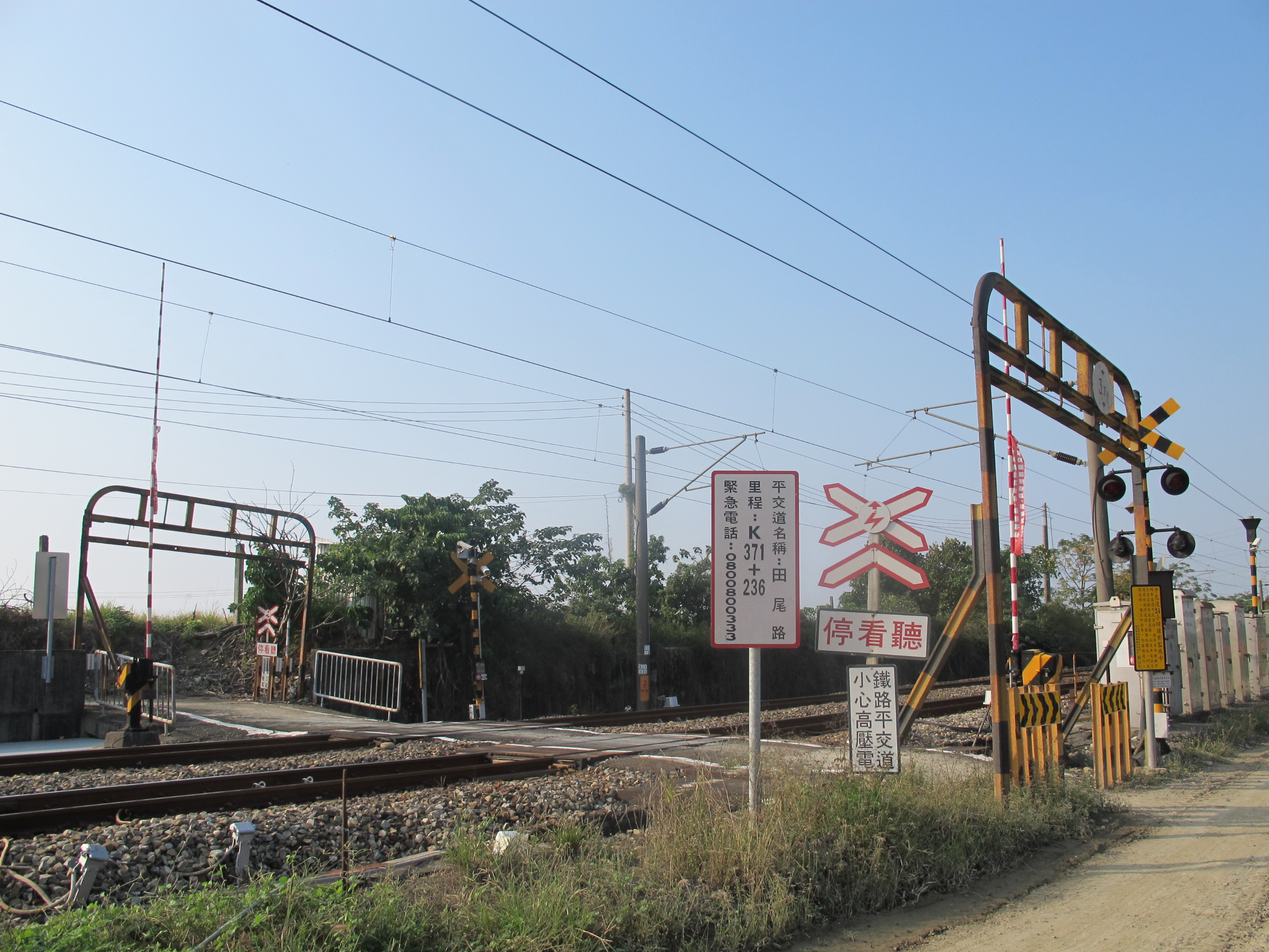 田尾路平交道